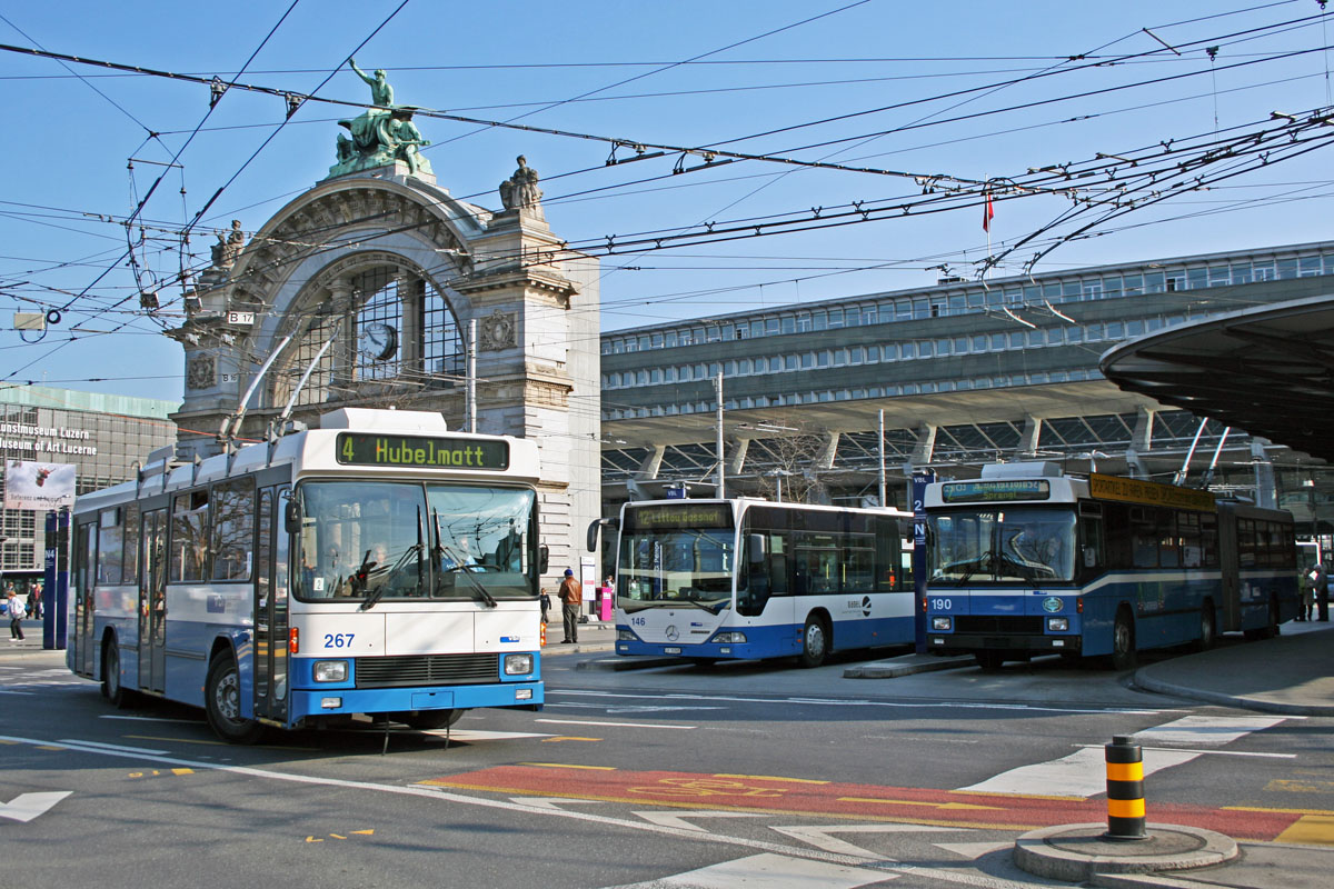 Der NAW/Hess/Siemens BT 5-25 Nr. 267 trifft am Bahnhof Luzern auf den NAW/Hess/Siemens BGT 5-25 Nr. 190. In der Mitte ist noch der Mercedes-Benz O 530 G Nr. 146 zu sehen.